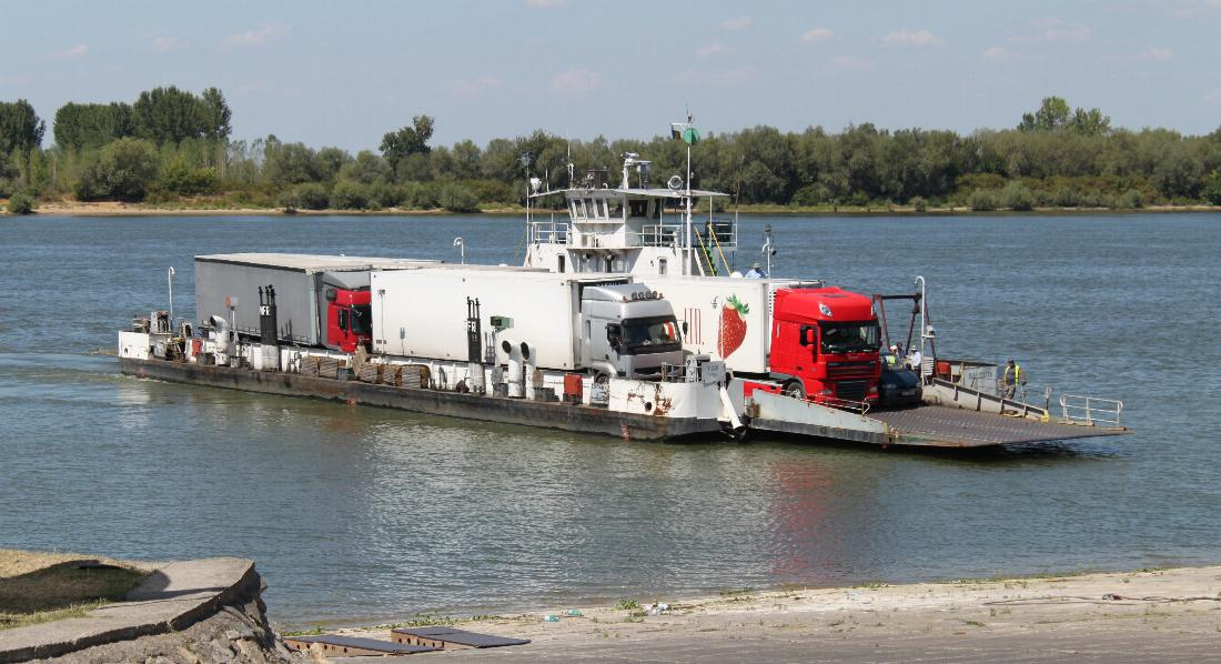 Fähre Vidin-Calafat legt im Hafen von Calfat an Kapazität : max. 160 Tonnen, 160 Passagiere